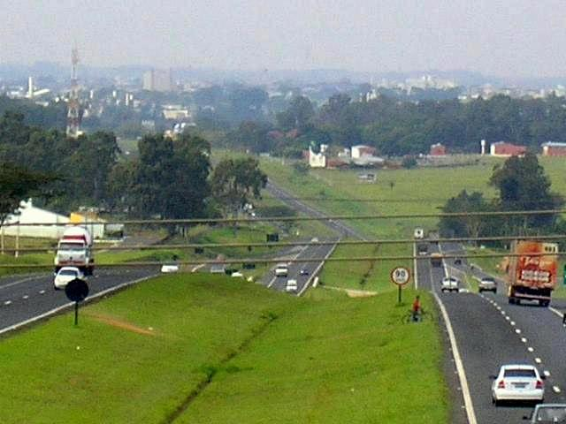 Vista da rodovia Washington Luiz (trecho que liga a cidade de São José do Rio Preto e Mirassol)